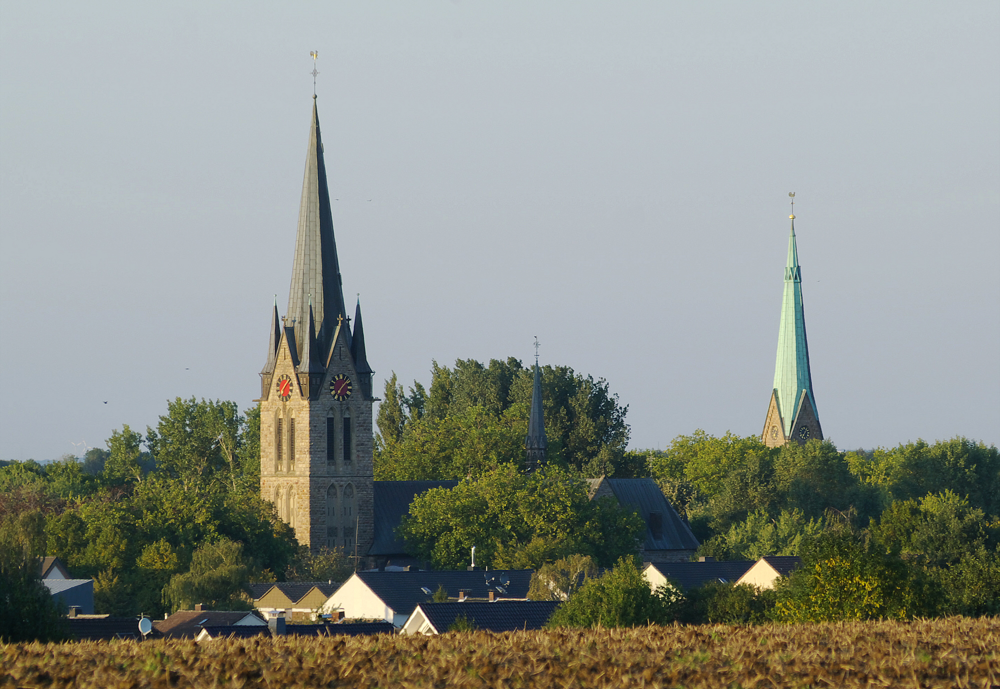 Blick auf die Kirchtürme Holzwickedes vom Quellenweg aus; Liebfrauenkirche (links) und evangelische Kirche (rechts)